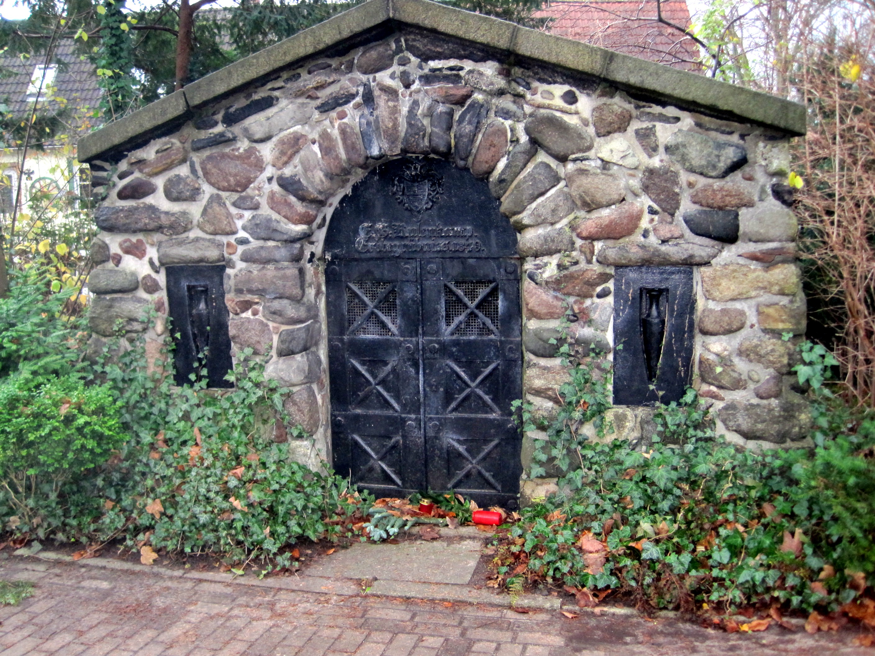 Familienbegräbnis der Familie Kulenkamp auf dem Lübecker Burgtorfriedhof.